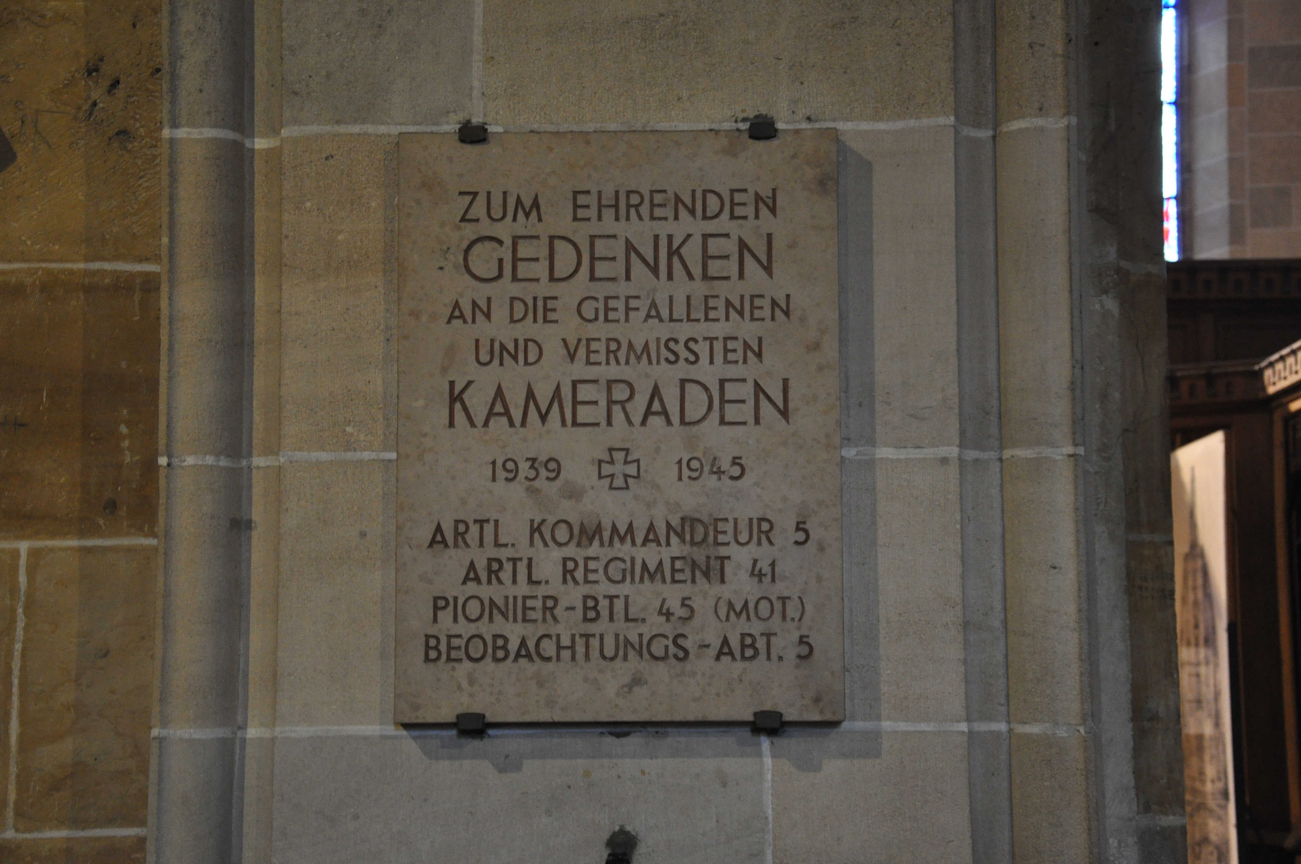 Ulm, Ulmer Münster, Gedenktafel zum Gedenken an die Toten im Zweiten Weltkrieg; Artl. Kommandeur 5, Artl. Regiment 41, Pionier-Btl. 45 (Mot.), Beobachtungs-Abt. 3